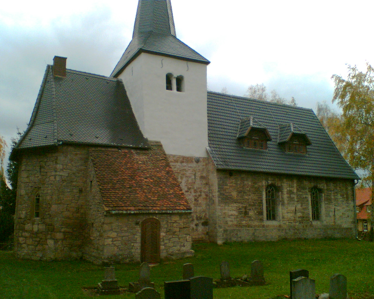 Die Kirche von Mittelsömmern, Stephan Heinemann, Bild selbst erstellt, 22.11.2006